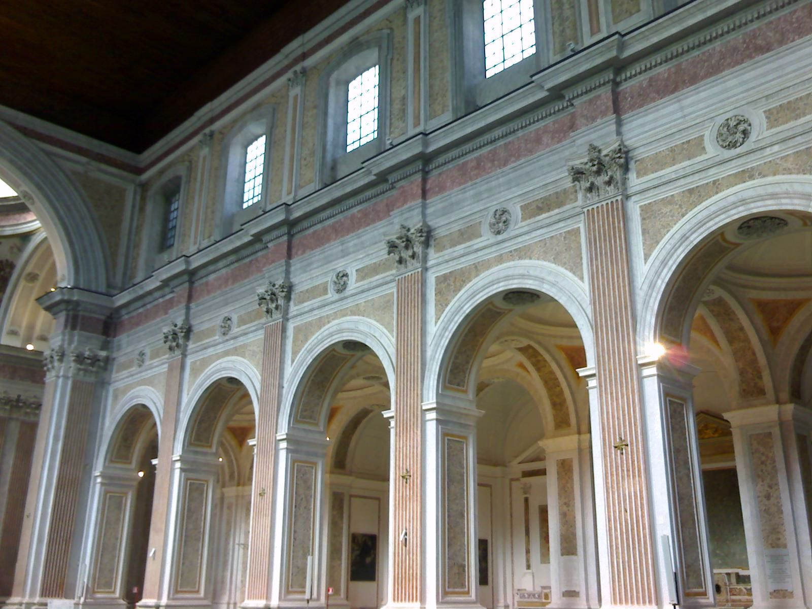 Chiesa di San Giovanni Maggiore di Napoli - Vista sulla navata destra